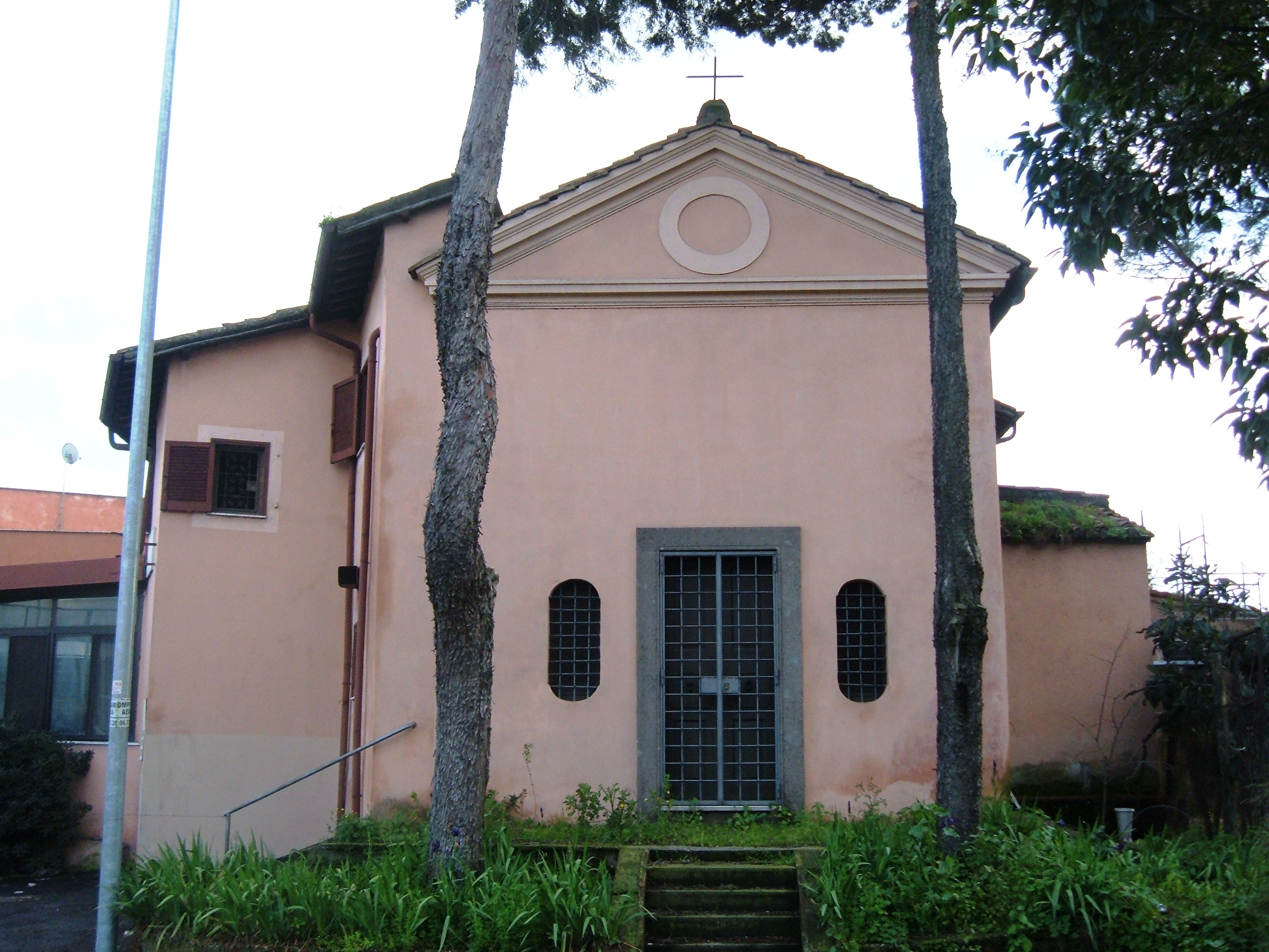 Chiesa di San Giovanni Battista nella zona Z.XVIII Capannelle (località Osteria del Curato).